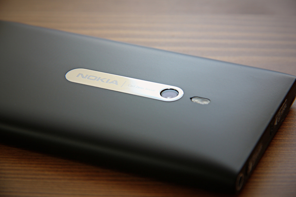 500px provided description: Nokia Lumia 800 [#mobile phone ,#nokia ,#windows phone ,#lumia ,#nokia lumia 800 ,#lumia 800]